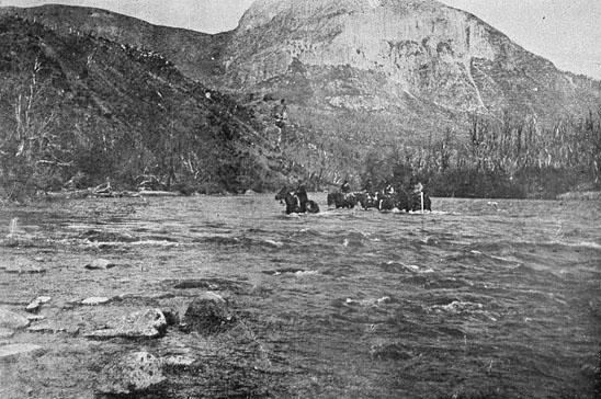 trabajadores de la Sociedad Industrial de Aysén cruzando un rio